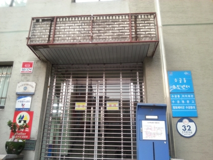 수궁동주민센터 입구. 서울특별시 구로구 궁동 213-42 (도로명주소 : 서울 구로구 오리로15길 32 (수궁동주민센터))